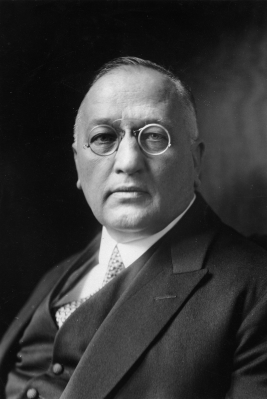 Der jugoslavische Innenminister Korochecz [Korosec ] weilt in Berlin. 42183-29 Information added by Wikimedia users.